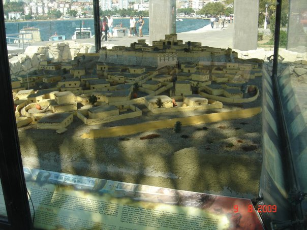 Troya maketi